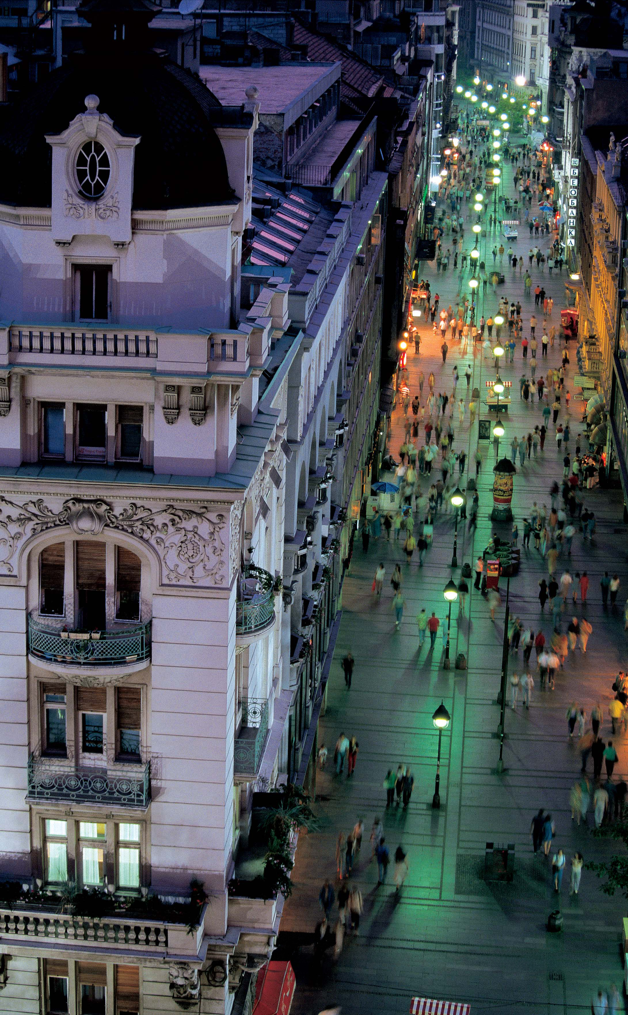 Knez Mihailova street